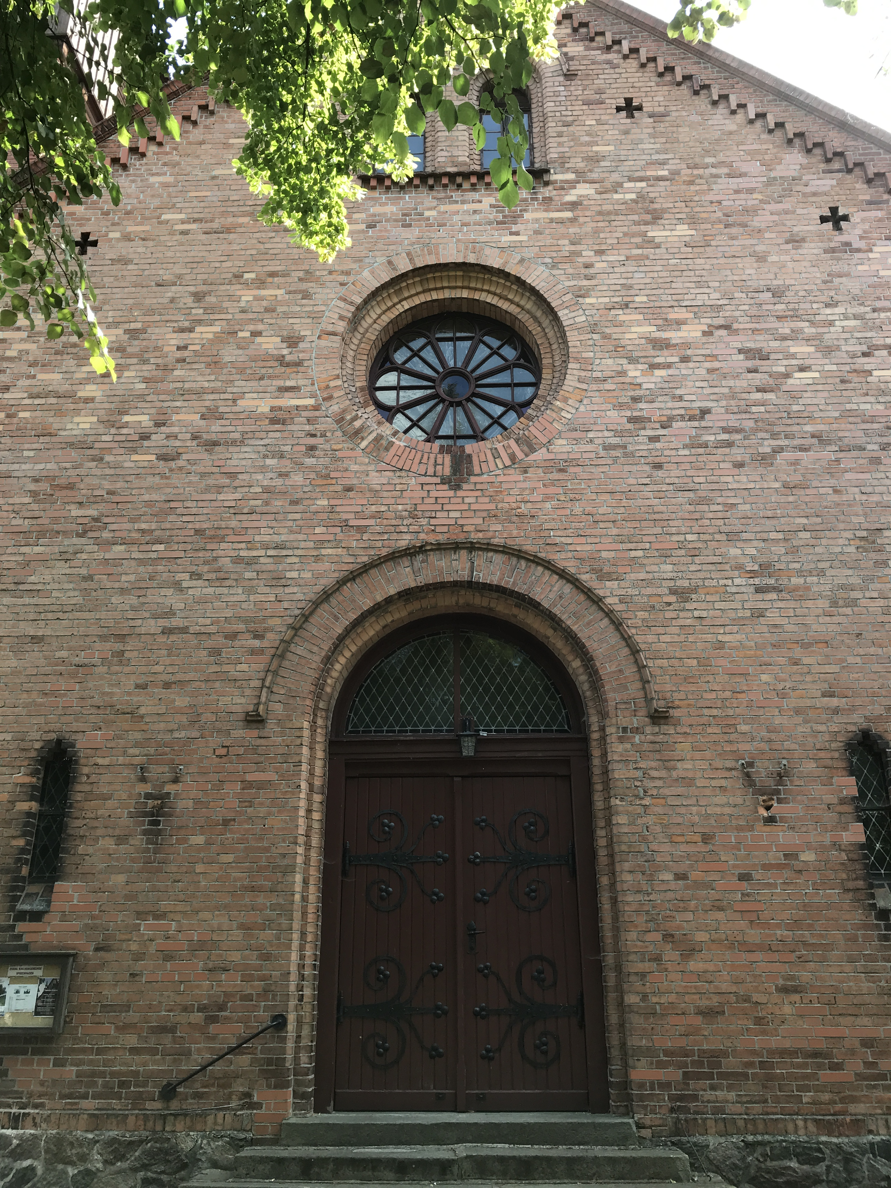 Die Dorfkirche Spreenhagen im Landkreis Oder-Spree im Land Brandenburg wurde 1855 aus gelbem Backstein im Rundbogenstil der Schinkelschule errichtet. Die Kirchenausstattung stammt aus dem Jahr 1902.